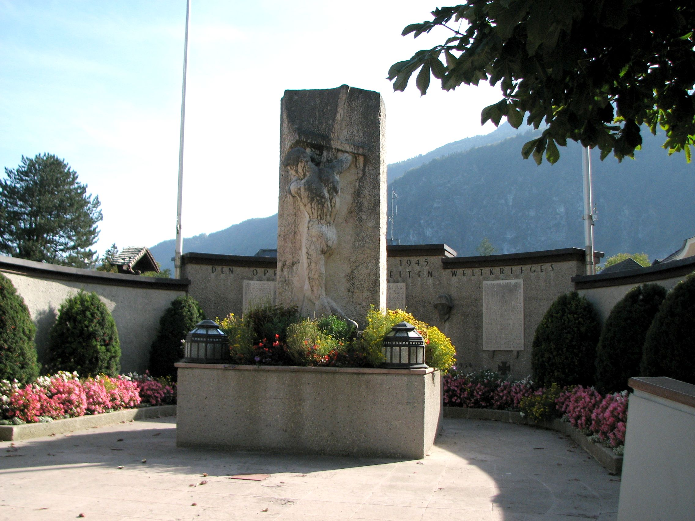 Kriegerdenkmal